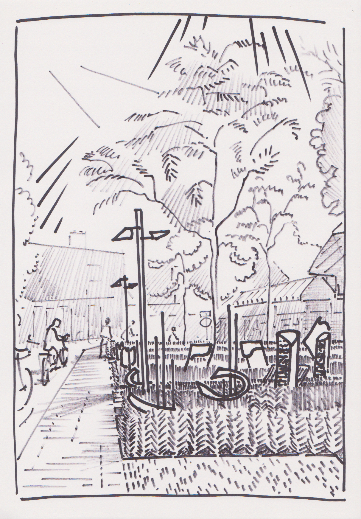 De tuin achter de Lambertus Basiliek wordt om en om gebruikt voor de presentatie van sculpturen dan wel van poëzie